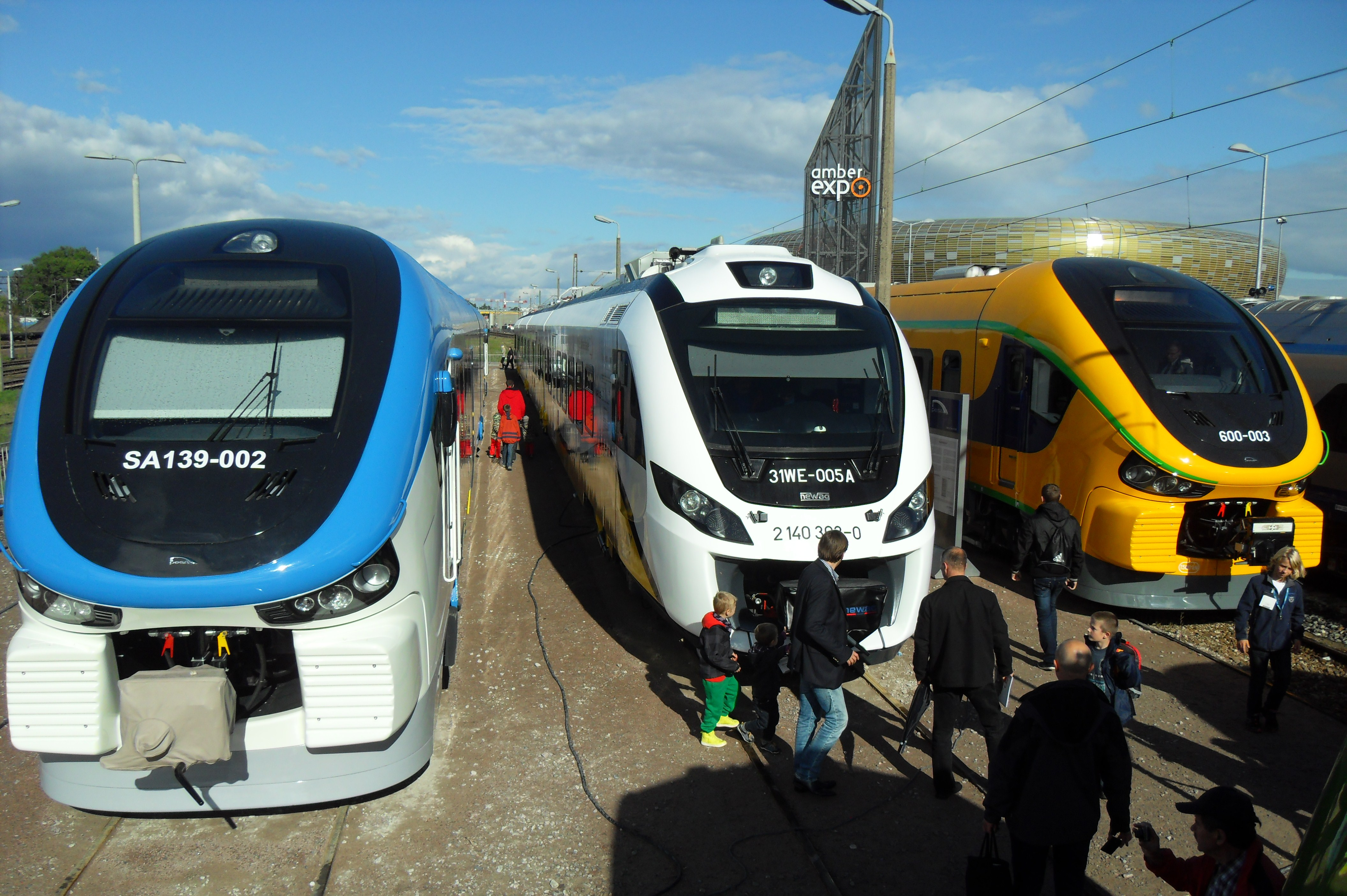 TRAKO 2013 w Gdańsku: PESA SA139-002, Newag 31WE-005A, PESA 600-003.